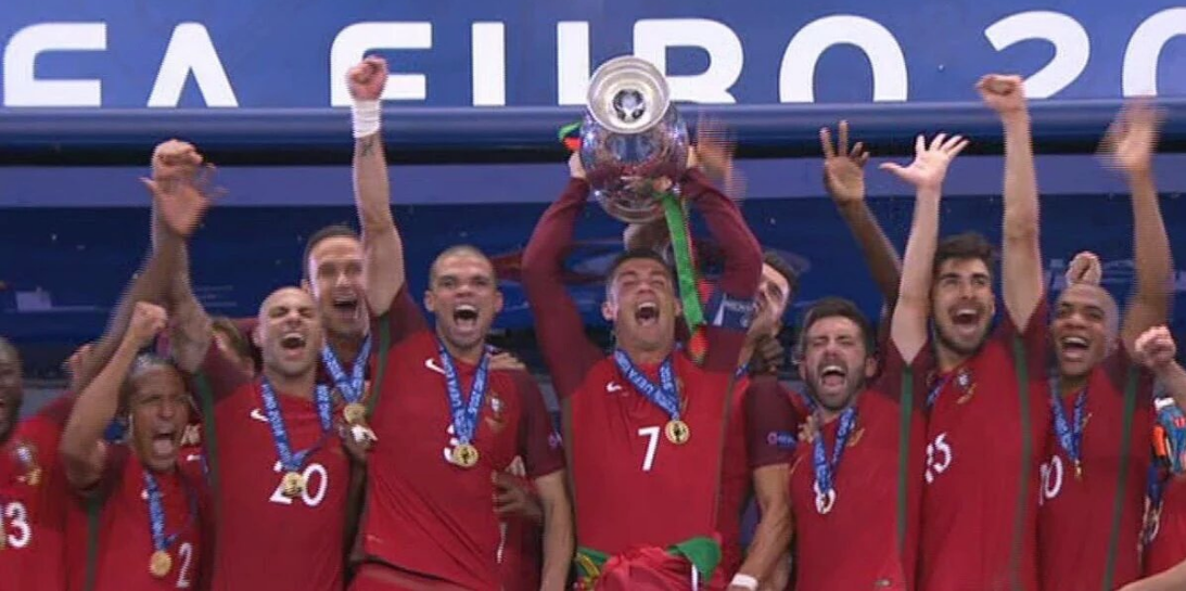 Seleção de Portugal campeã do Campeonato Europeu de 2016